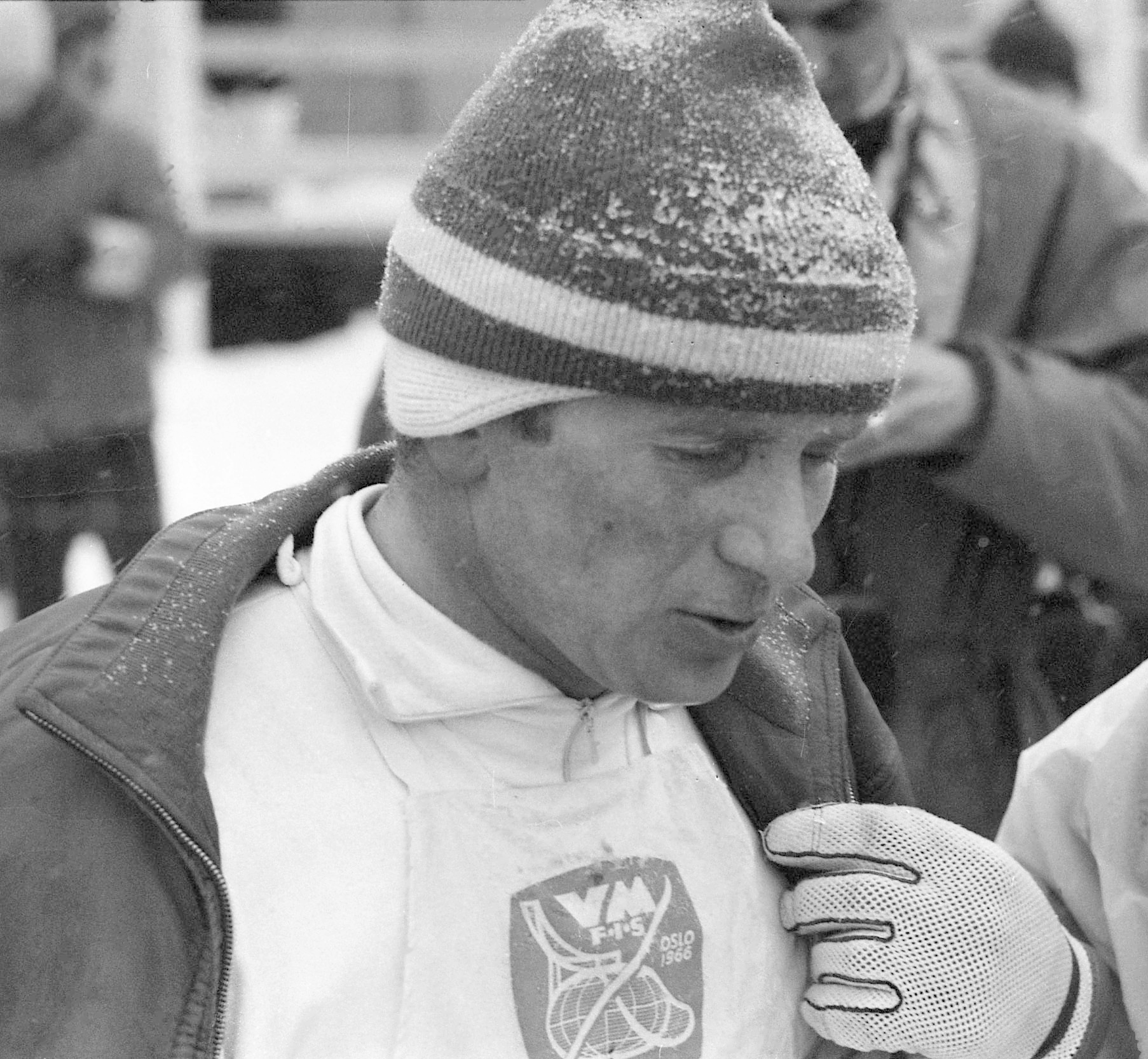 Beskrivelse: Kominert langrenn, 15 km. Gullvinner tyskeren Georg Thoma (Tyskland/Germany`) Fotograf: Billedbladet NÅ/van Deurs Sted: Oslo År: 1966 Arkivreferanse: RIKSARKIVET- RA/PA/0797/U/Ua/3901_1_037 GOLD WINNER GEORG THOMA AFTER CROSSING THE FINISHING LINE, 15 KM NORDIC COMBINED, WORLD CHAMPIONSHIPS IN OSLO 1966 Photographer: Billedbladet NÅ/van Deurs Place: Oslo Year: 1966 Archival reference: RA/PA/0797/U/Ua/3901_1_037